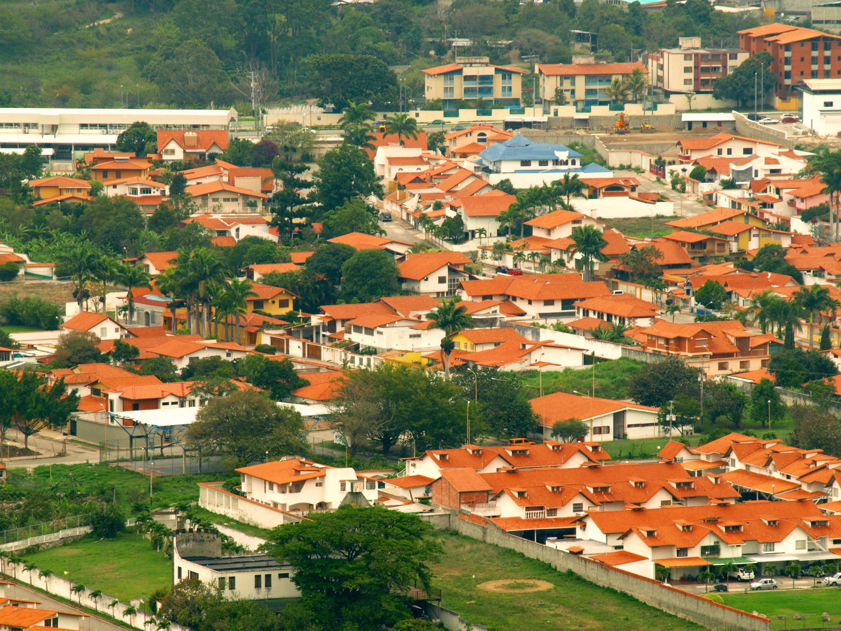 Convivencia urbana. Merida